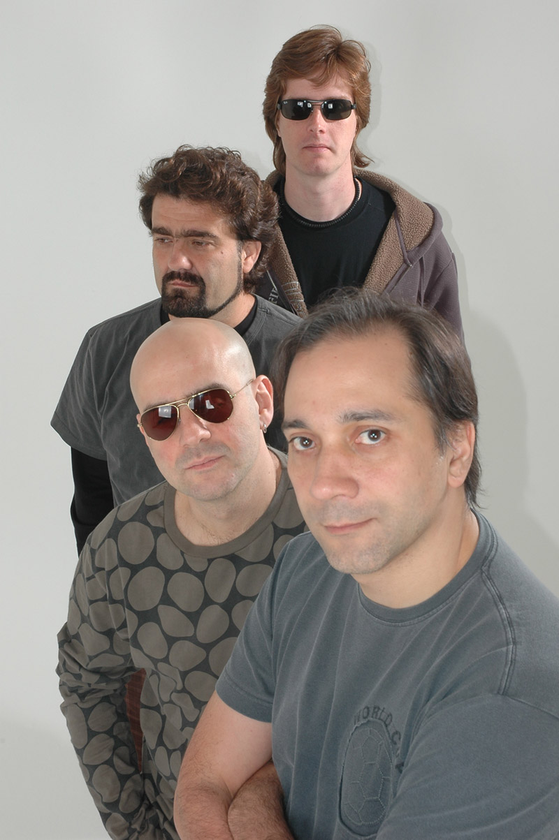 Foto: Divulgação